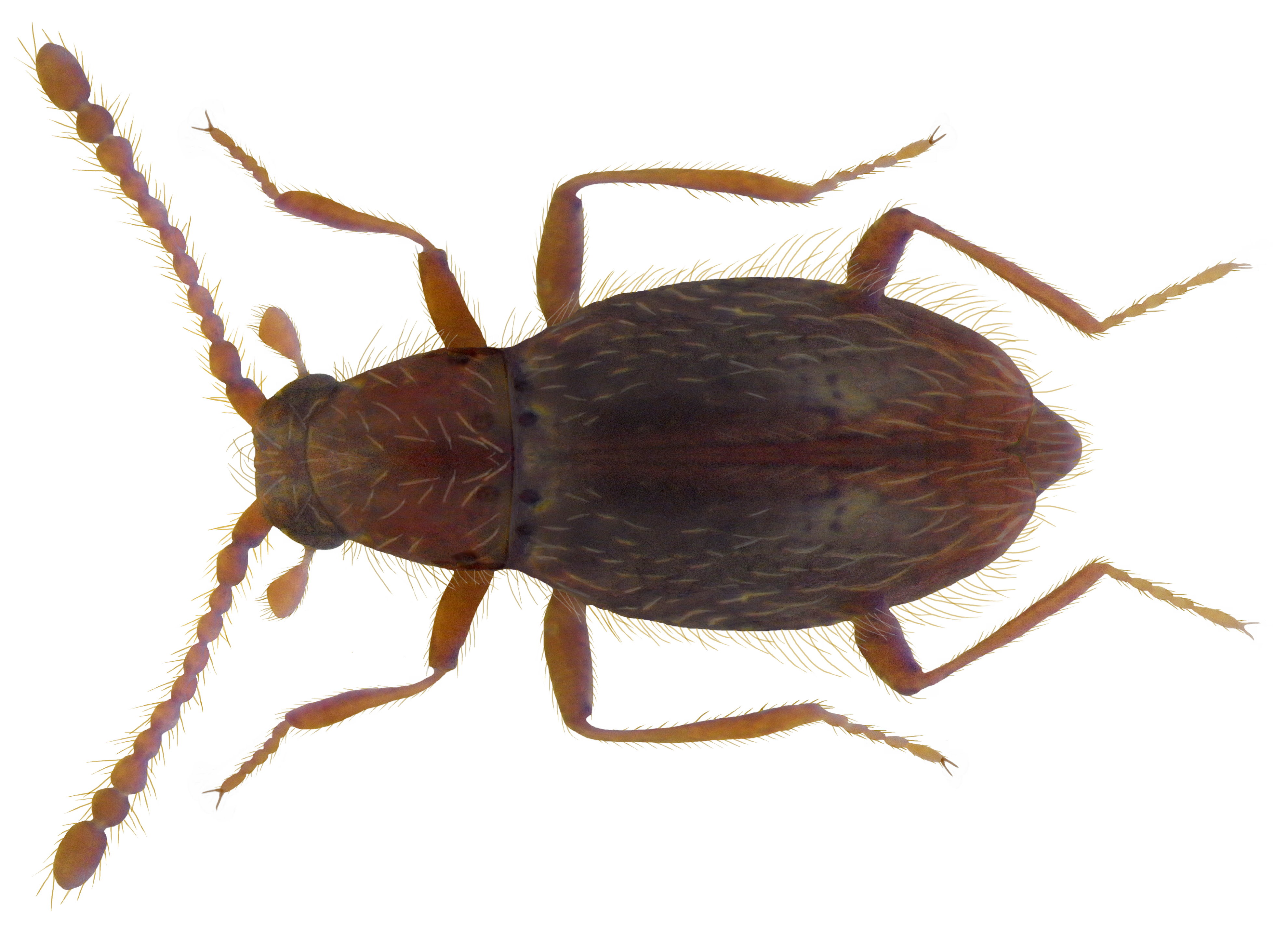 Familie: Scydmaenidae Groesse: 1,0-1,15 mm Verbreitung: Europa Ökologie: in faulem Holz, in Moos und feuchtem Laub Fundort: Germania, Thüringen, Weida leg. A.Weigel, 2009; det. W.Apfel, 2009 Photo: U.Schmidt, 2010